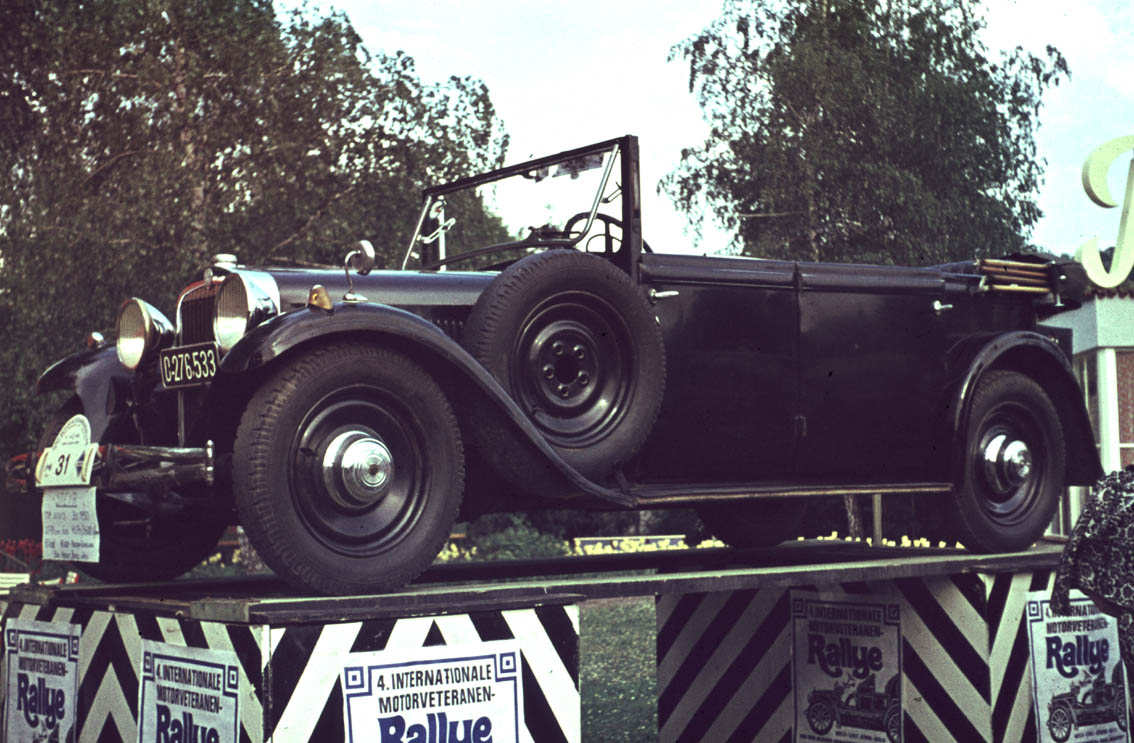 Steyr Typ XX Cabriolet 1930